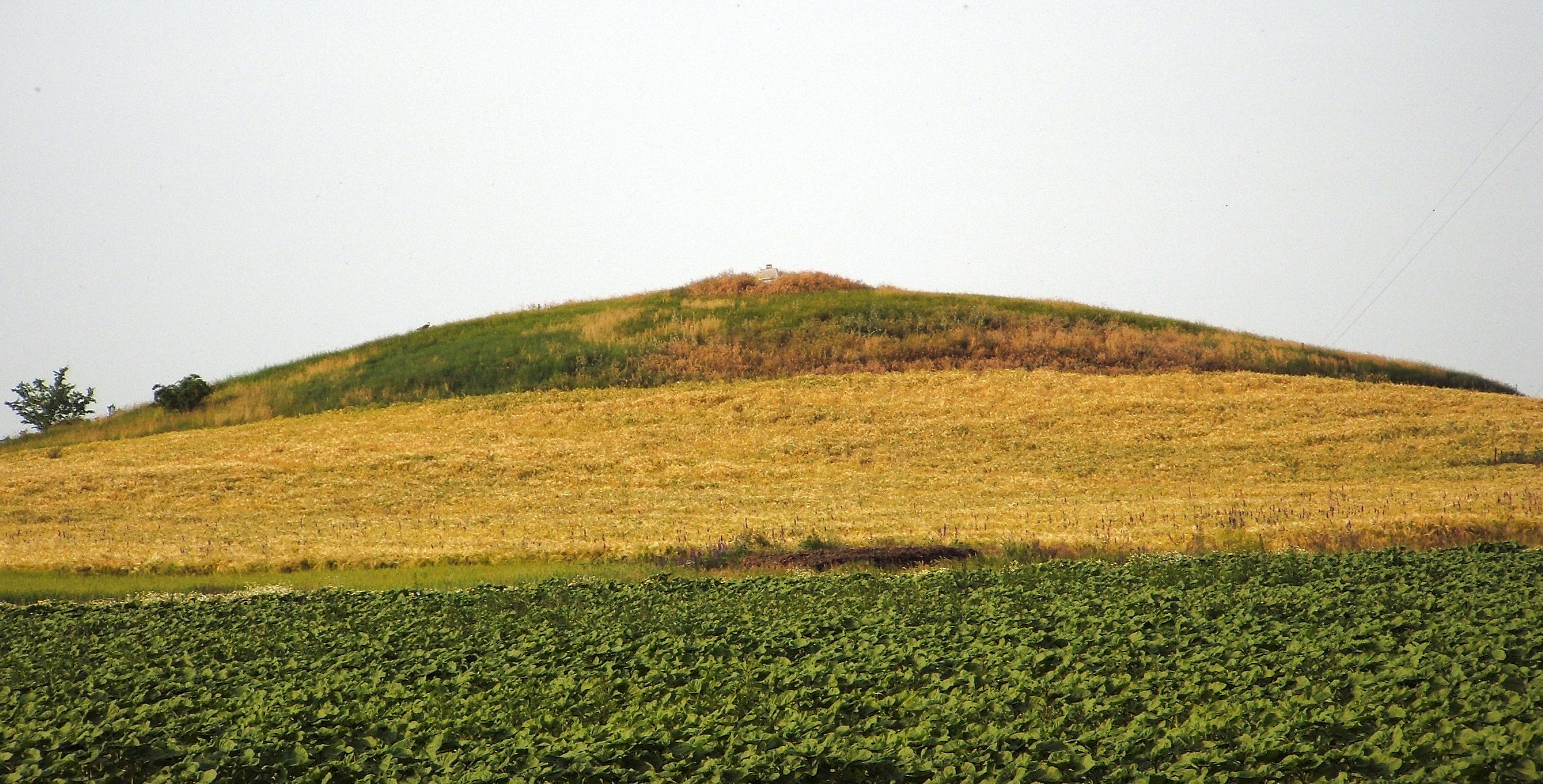 A Sáp-halom Szentes és Szegvár között.